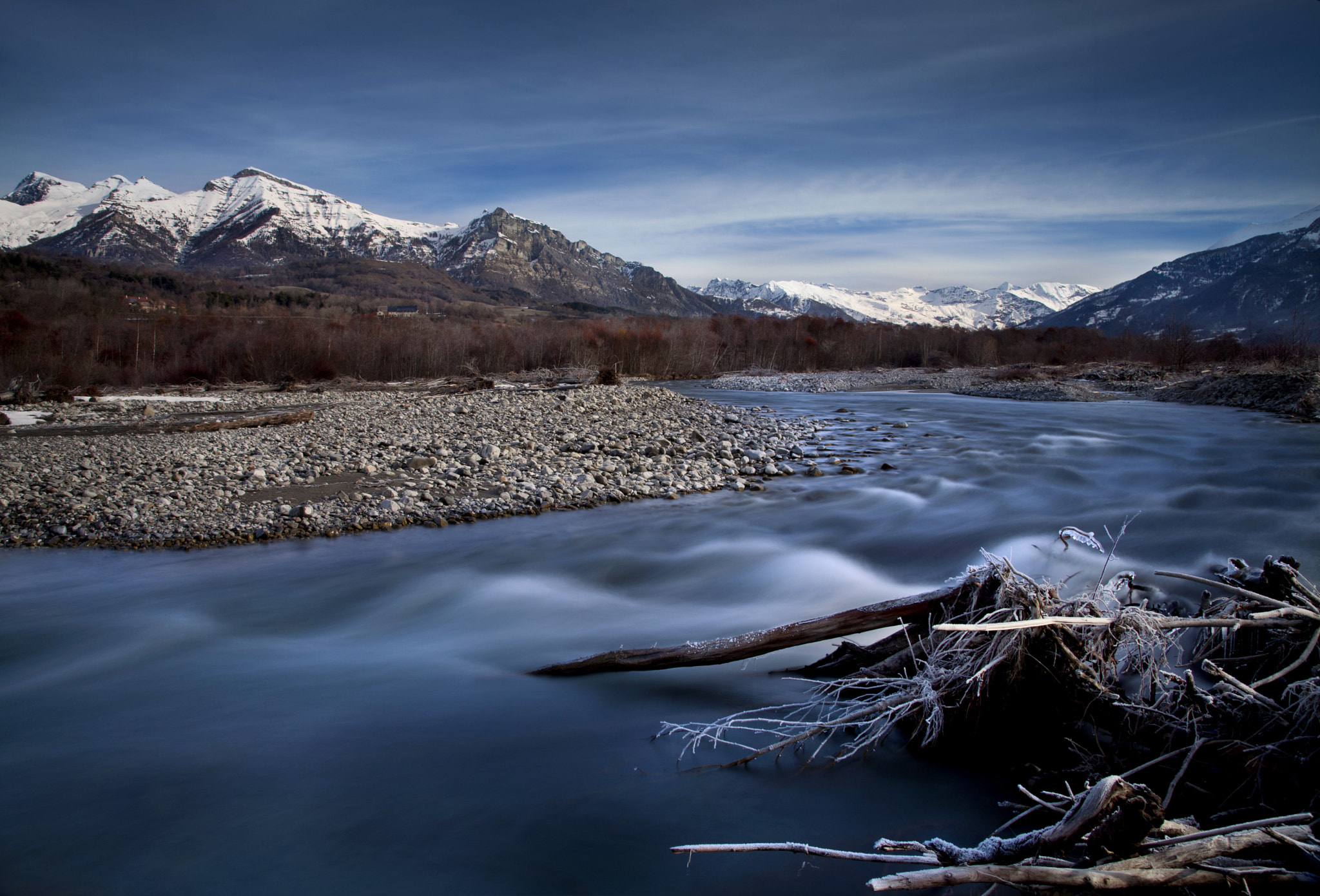 500px provided description: Drac River and Champsaur Valley [#color ,#river ,#blue ,#snow ,#long exposure ,#moutains ,#torrent ,#montagne ,#paysage ,#eau ,#slow shutter ,#ciel ,#nuages ,#nuage ,#vague ,#ext?rieur ,#Champsaur ,#Alps]